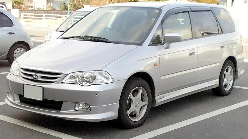 2代目ホンダ・オデッセイ（日本仕様）